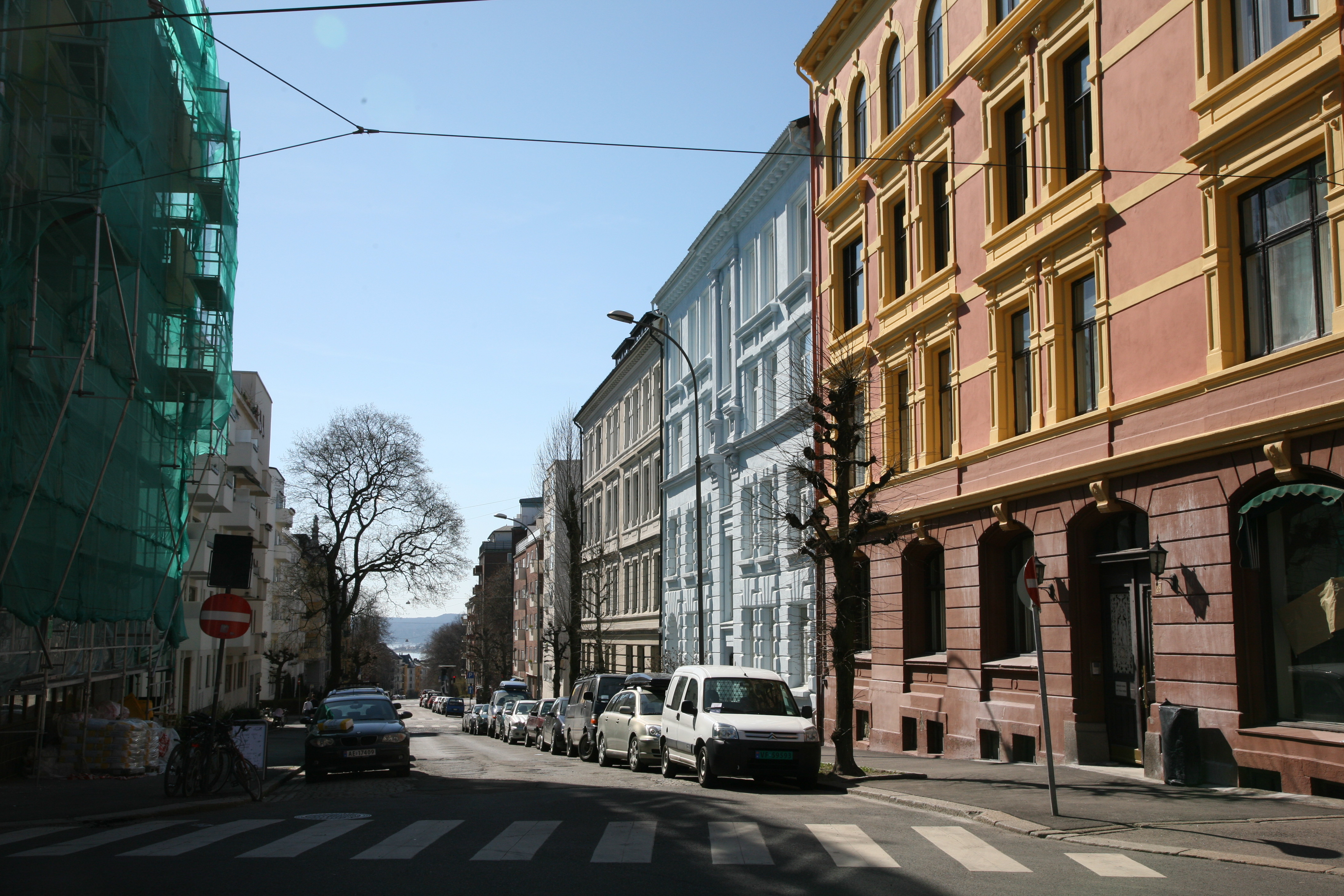 Gabels gate, Oslo